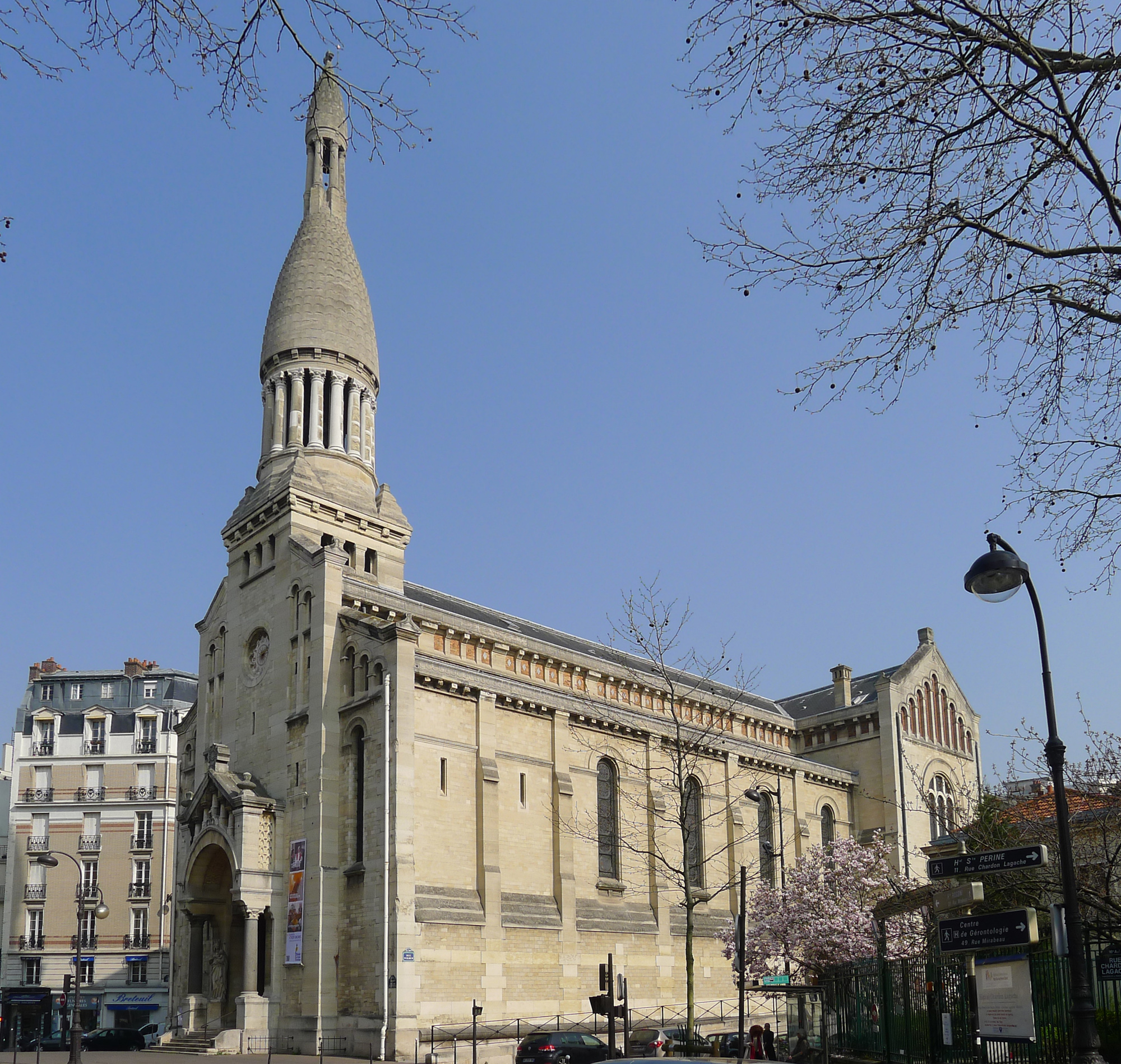 Église Notre-Dame-d'Auteuil - Paris XVI